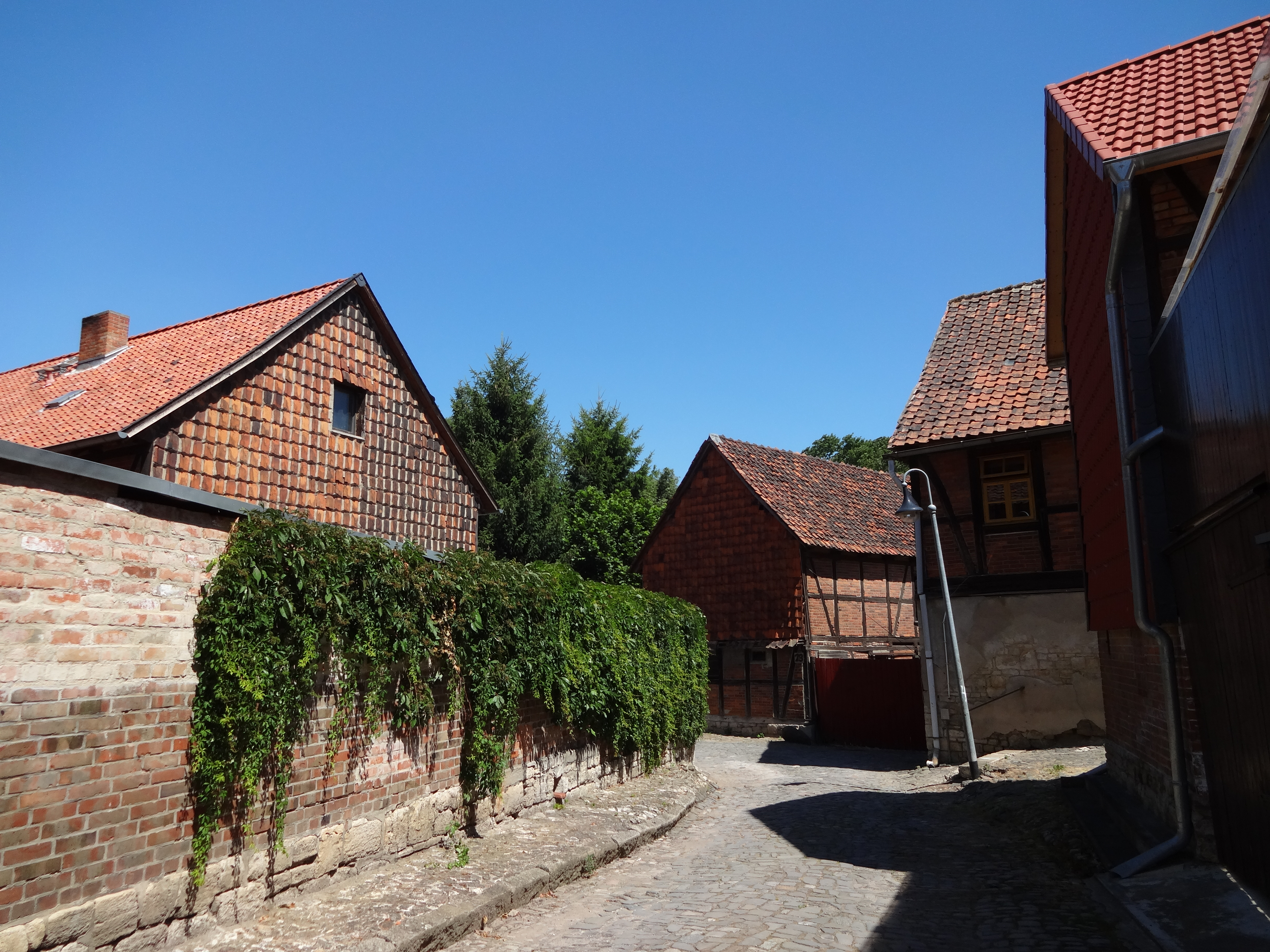 denkmalgeschützter Straßenzug Wrampestraße 1, 2, 13, 14, 15 in Dedeleben, Sachsen-Anhalt